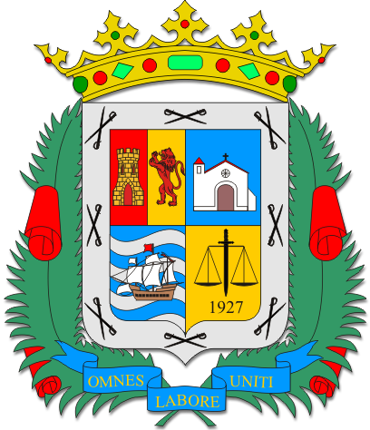 Este es el escudo de La Aldea de San Nicolás.